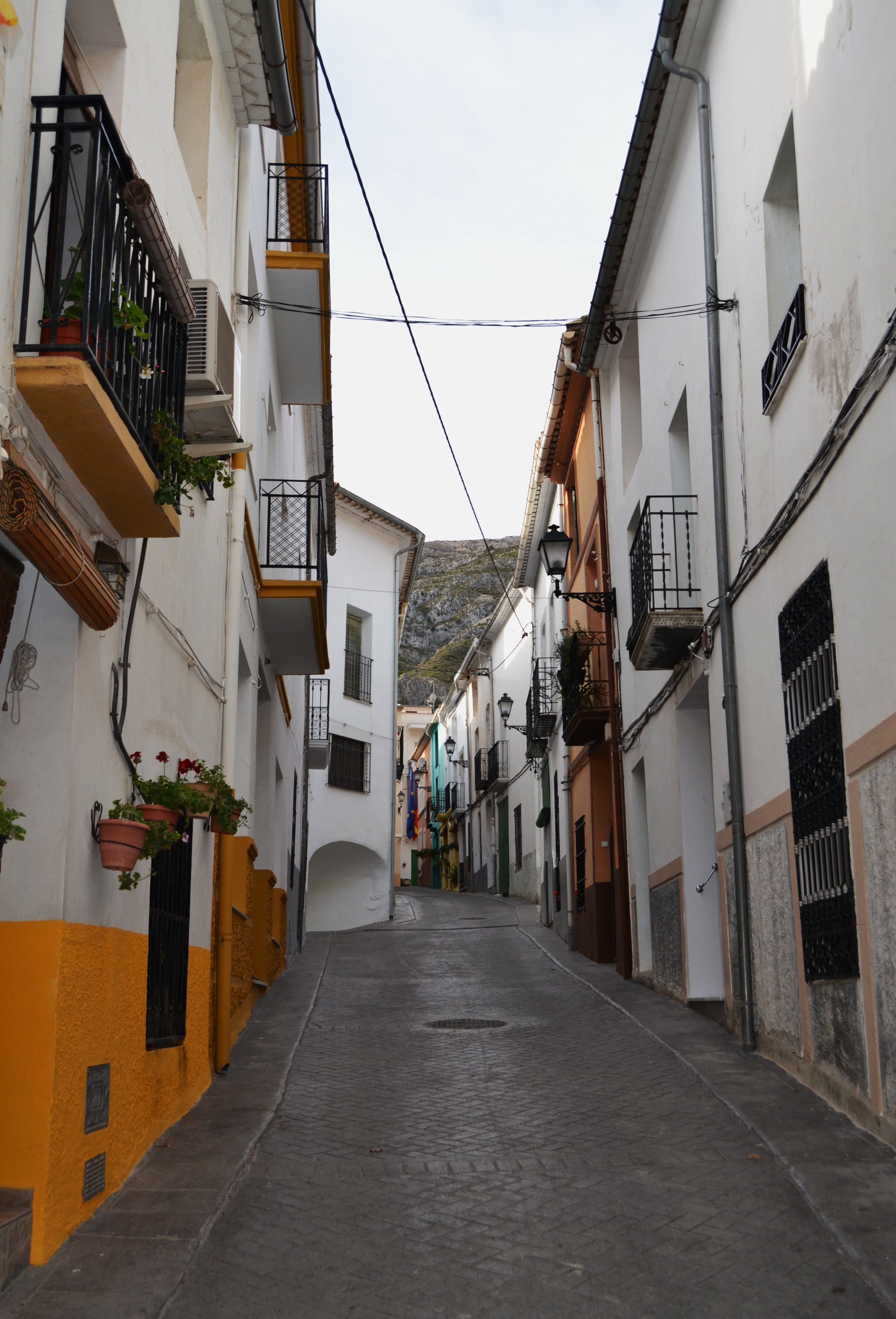 Carrer de Famorca.